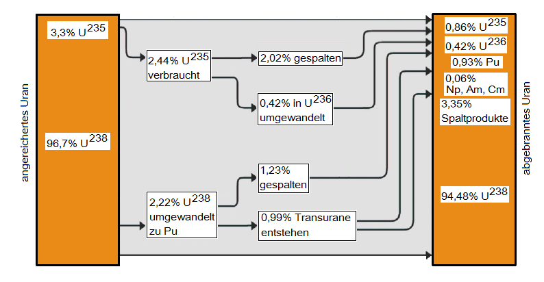 Umwandlungen der Atomsorten eines Brennelementes